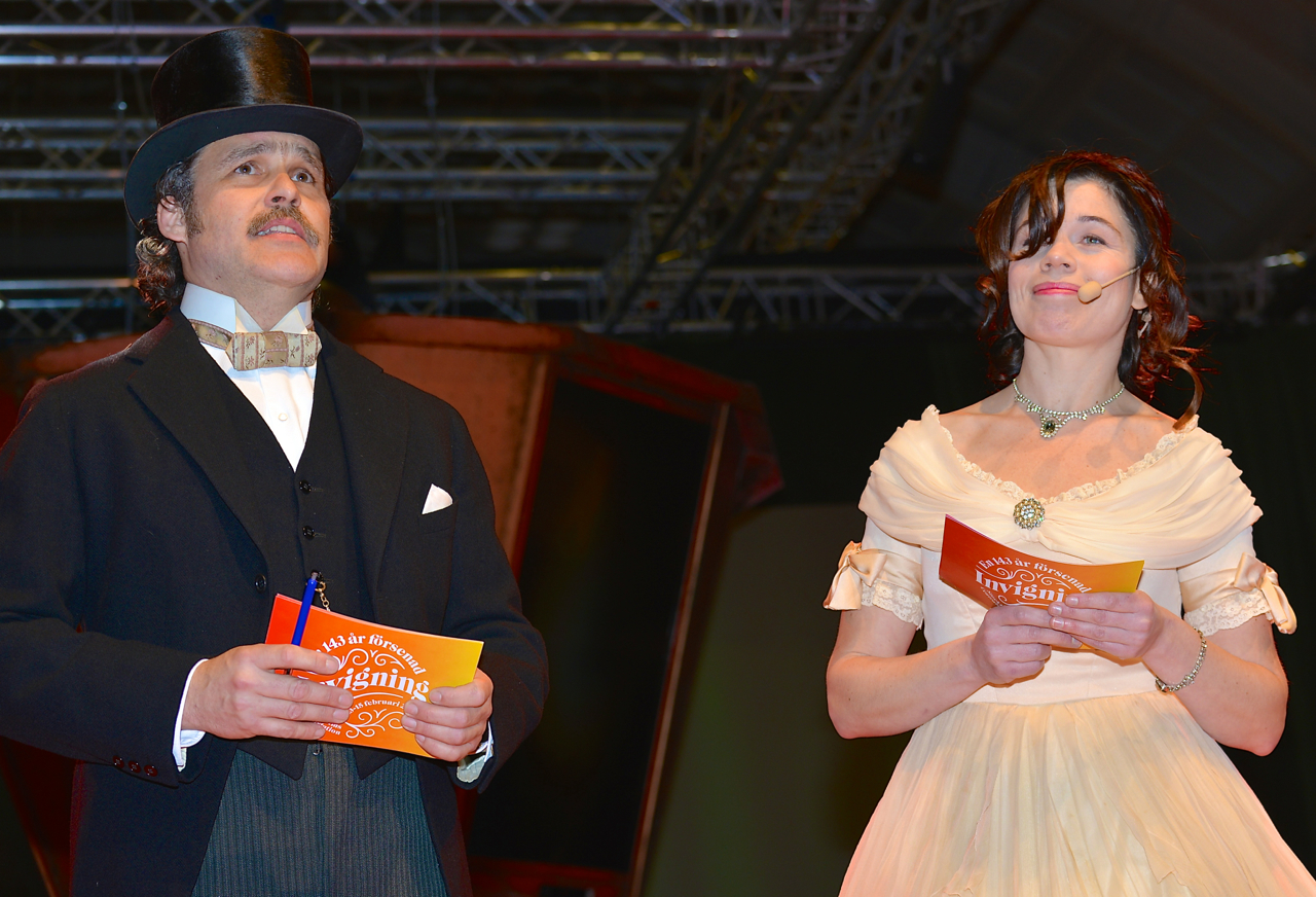 En moderniserad Stockholms Centralstation nyinvigs den 13 februari 2014 efter en försening på 143 år. Värdarna för ceremonin, Erik Haag och Lotta Lundgren introducerar.